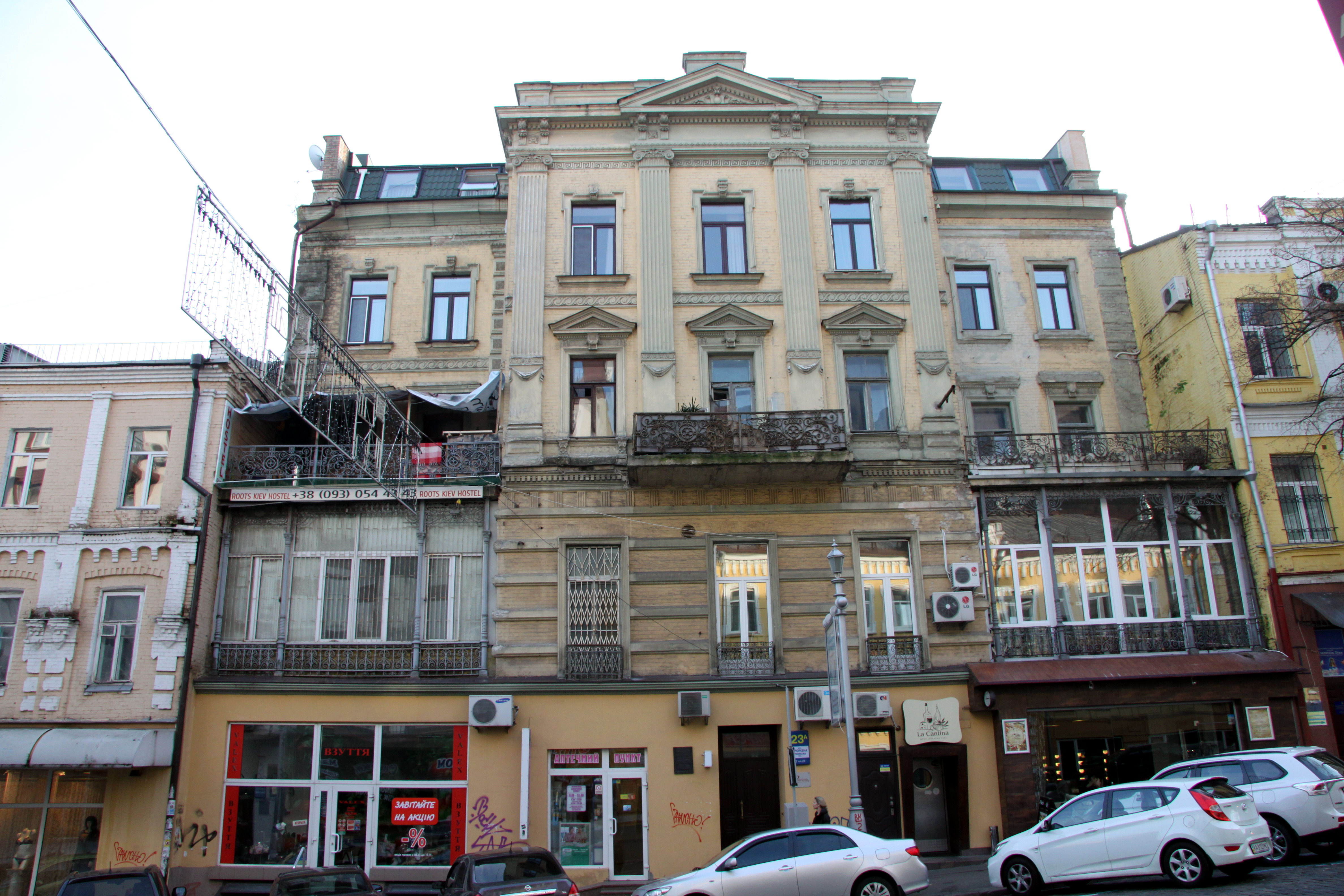 Будинок прибутковий, в якому містилося правління Київського товариства фотографів-аматорів «Дагер», проживав О. А. Сандлер, композитор, Прорізна вул., 23-а, Київ